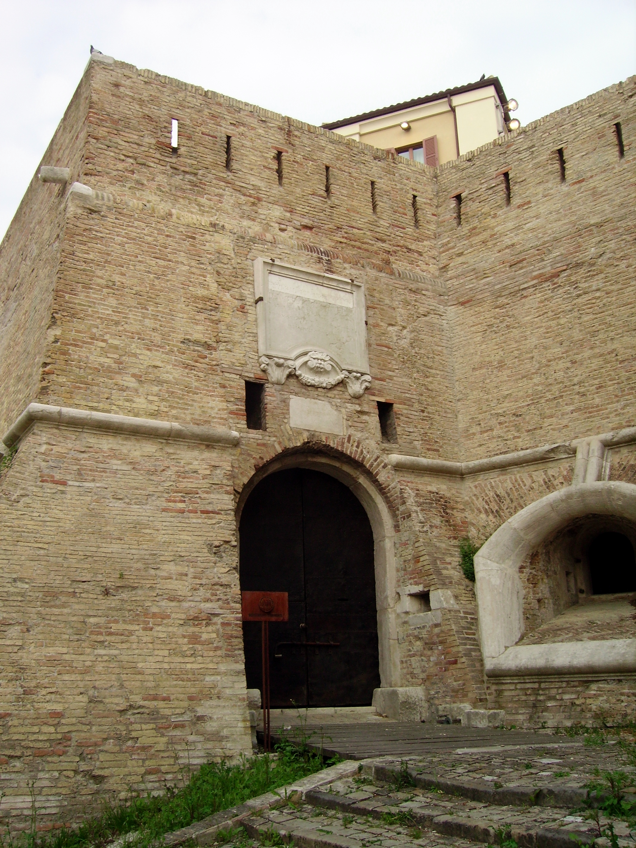 Entrata della Cittadella di Ancona.